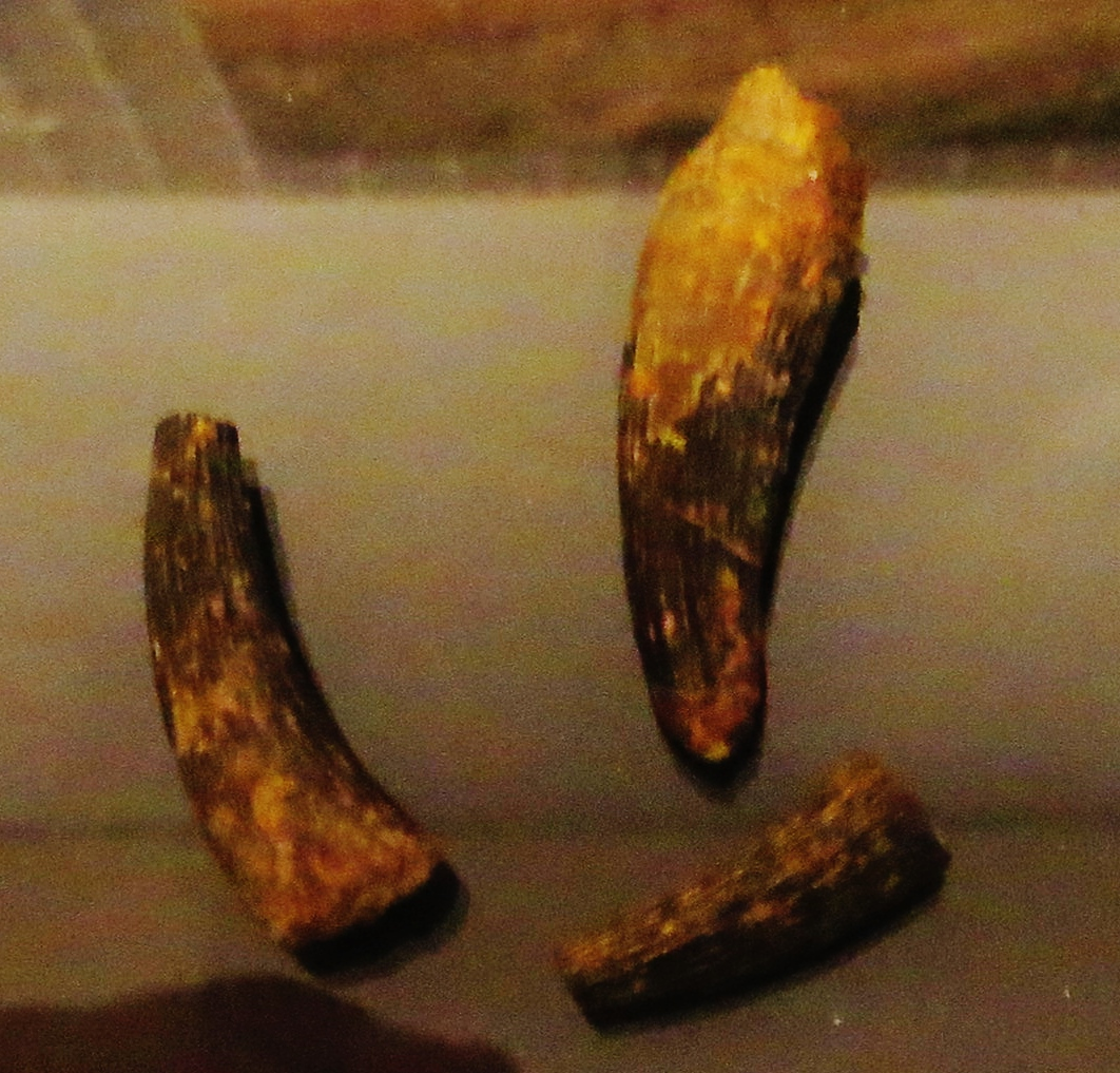 Fossil of Termatosaurus, an extinct reptile- Took the picture at Museum of Paleontology, Tubingen